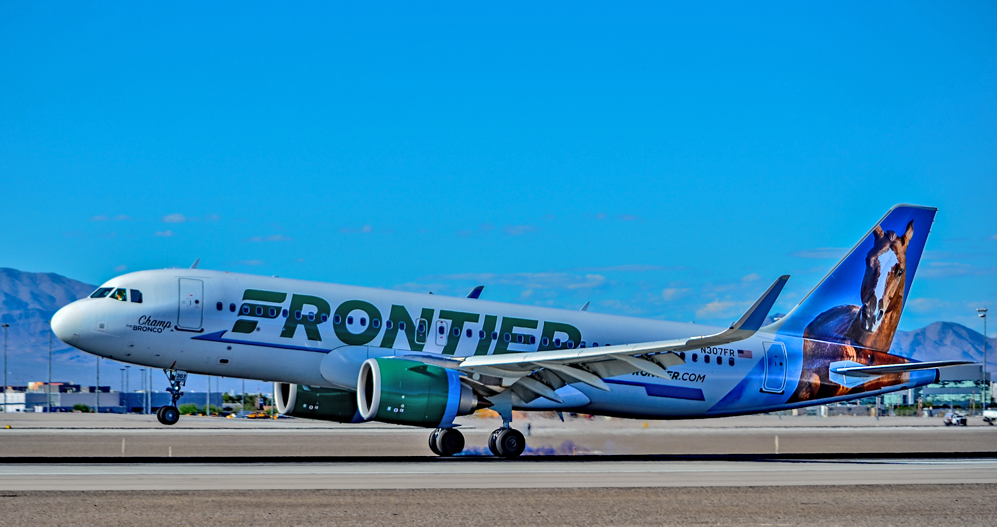 Las Vegas - McCarran International Airport (LAS / KLAS) USA - Nevada May 19, 2017 Photo: Tomás Del Coro